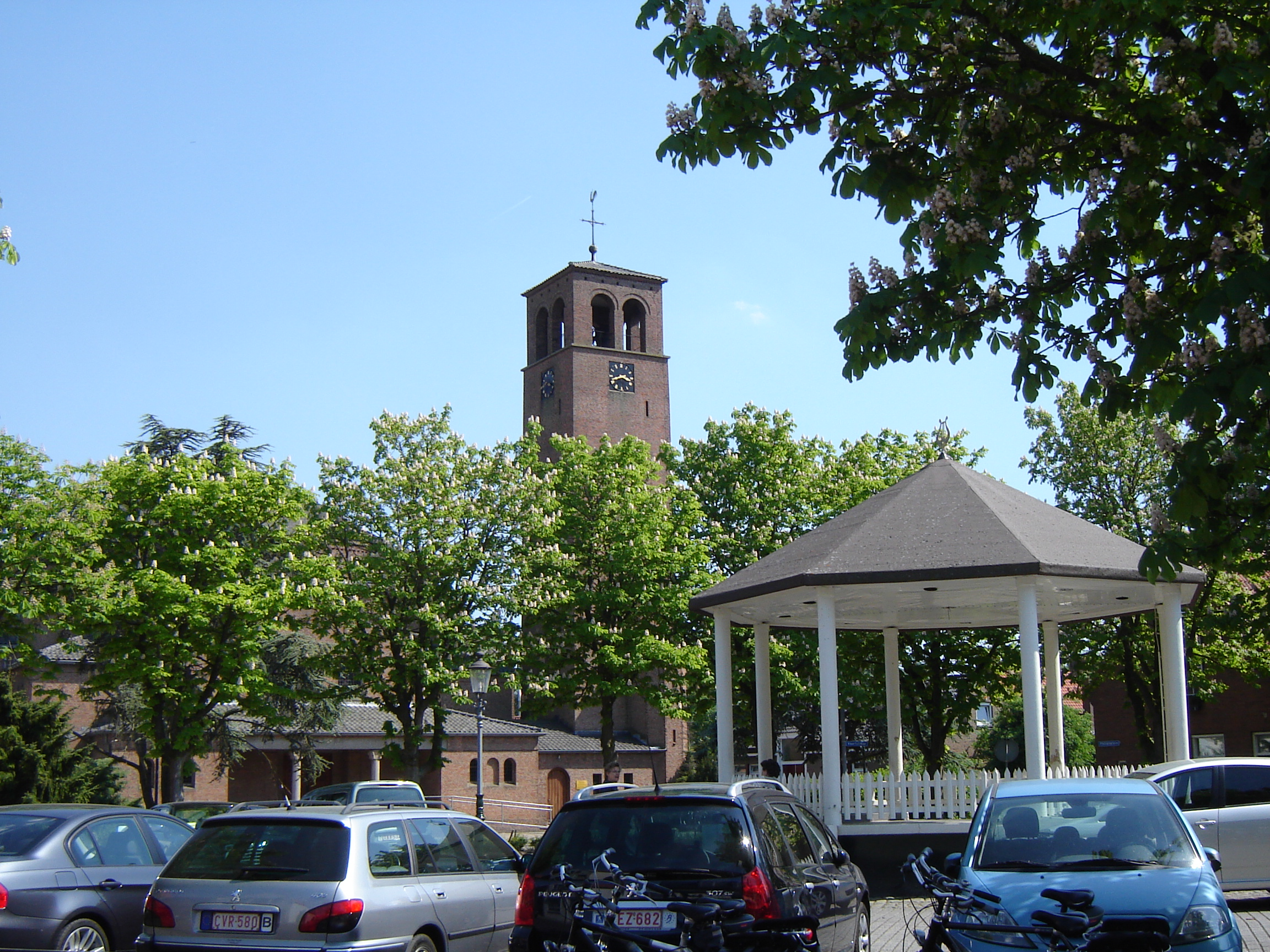 Philipsplein met kiosk en kerk in Philippine.Philipsplein square with bandstand and church. Philippine, Terneuzen, Zeeland, Netherlands